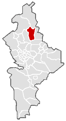 Ubicación geográfica del municipio de Vallecillo en el estado mexicano de Nuevo León.